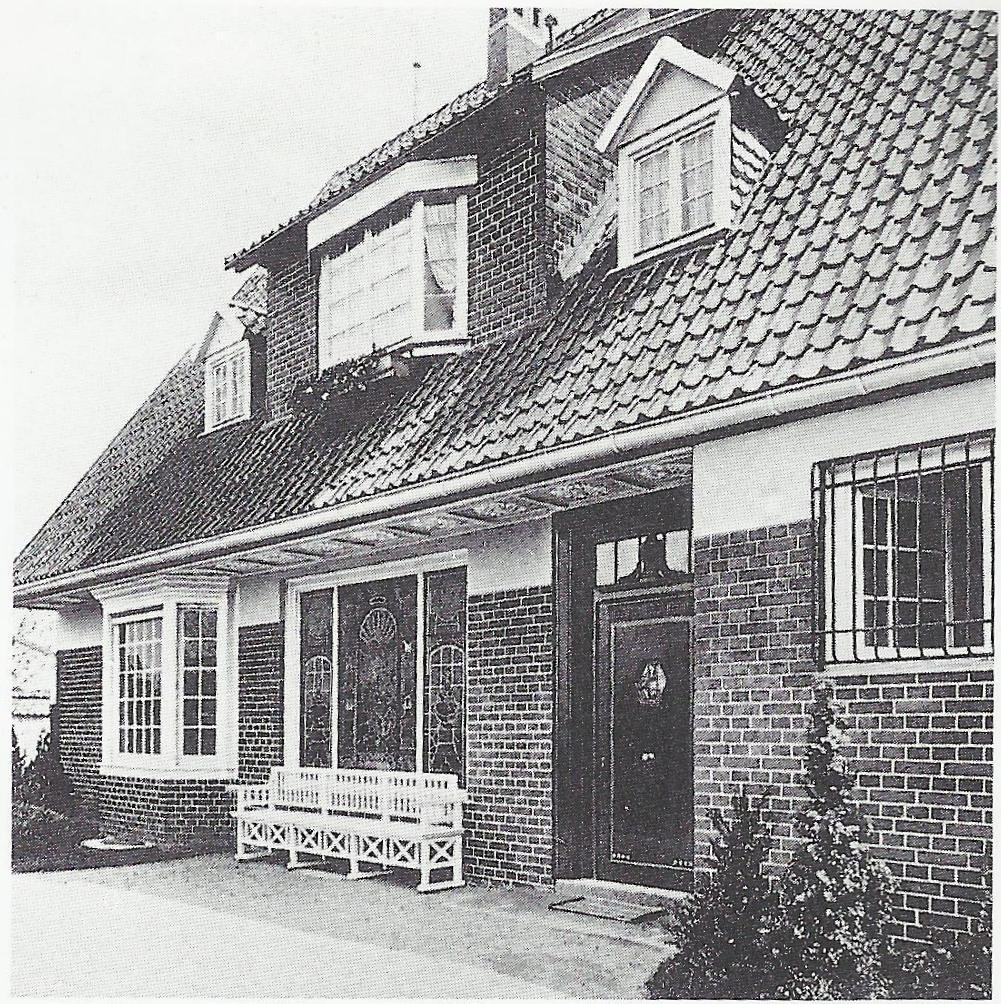 Villa Litzmann (im Zweiten Weltkrieg zerstört), Lindenallee 23, Köln-Marienburg: Detail der Straßenfassade